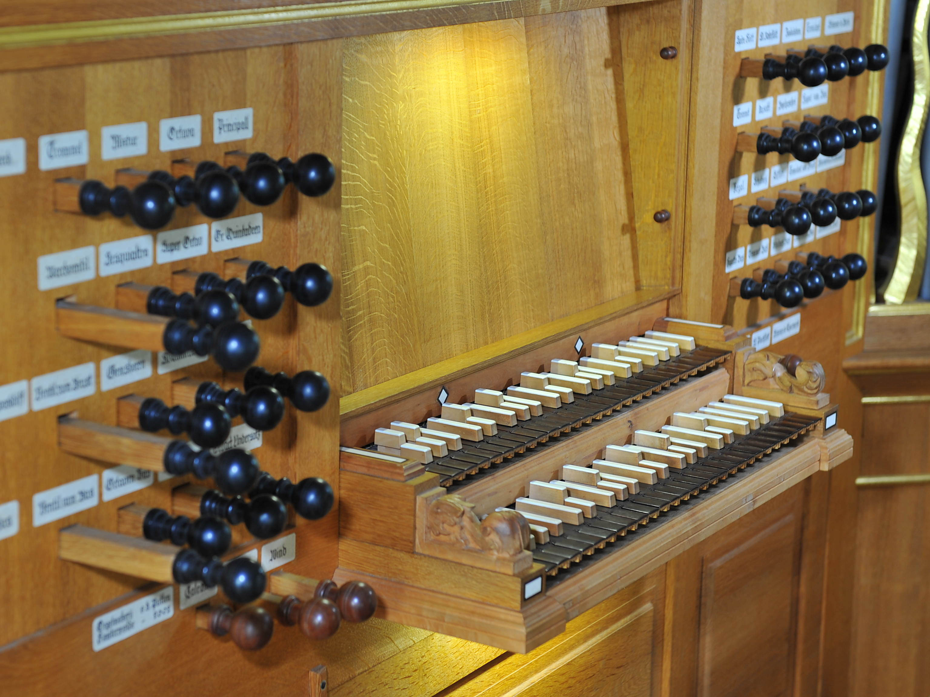 Spieltisch der Orgel in Bremen-Walle, Deutschland